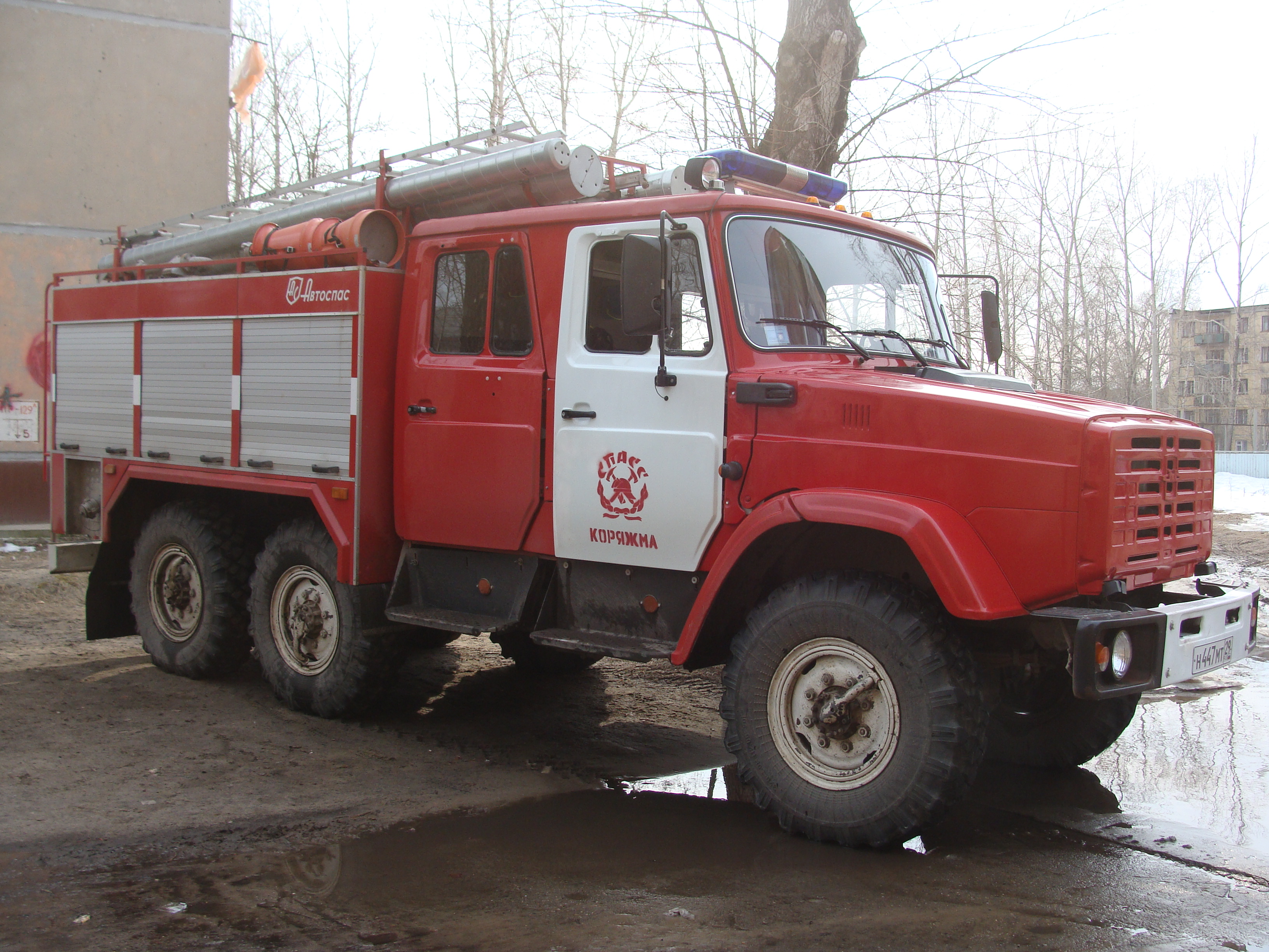 Тушение пожара в подвале дома Набережная 54а, Коряжма